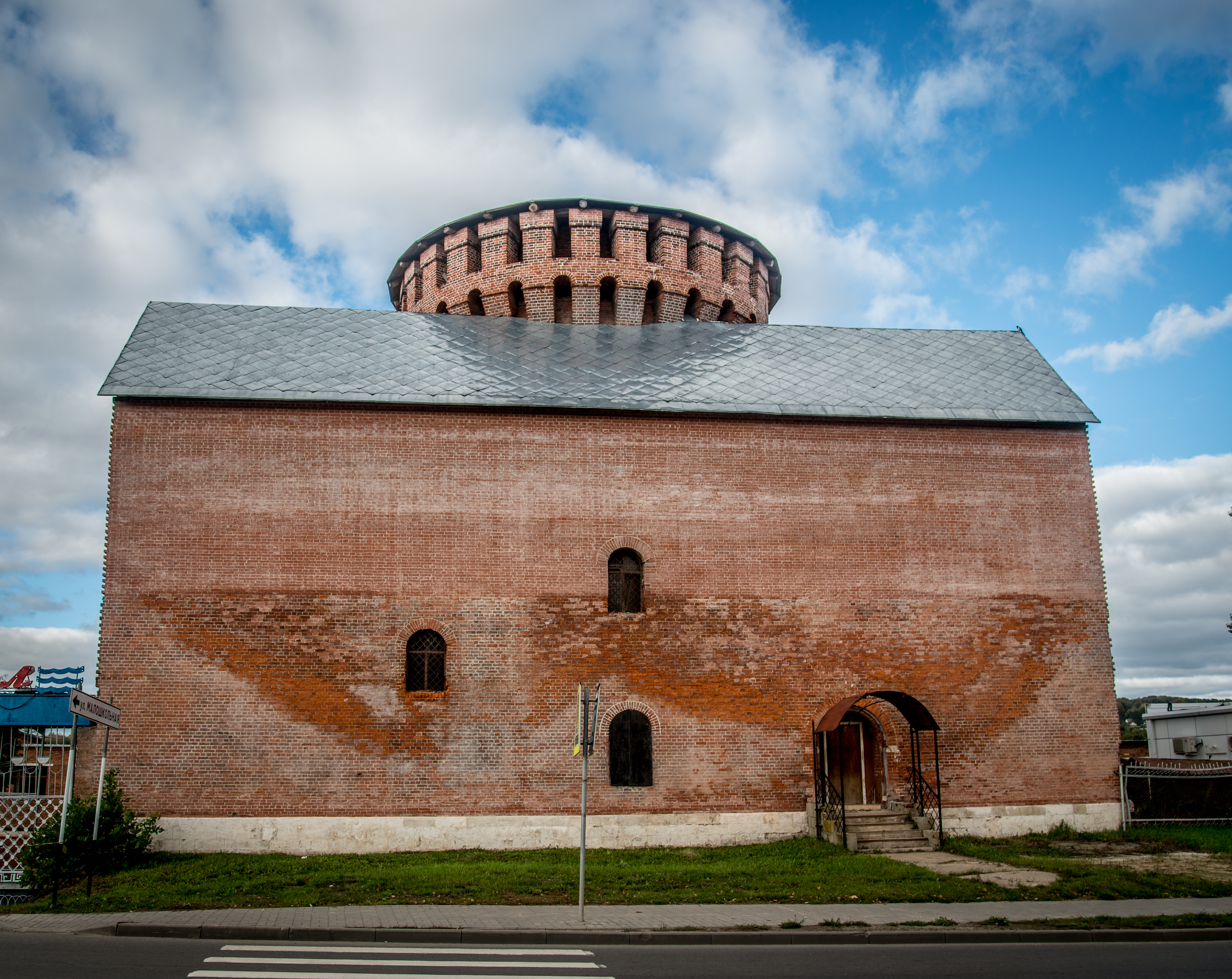 Башня Костаревская (Красная): Смоленск, Смоленский район, Смоленская область